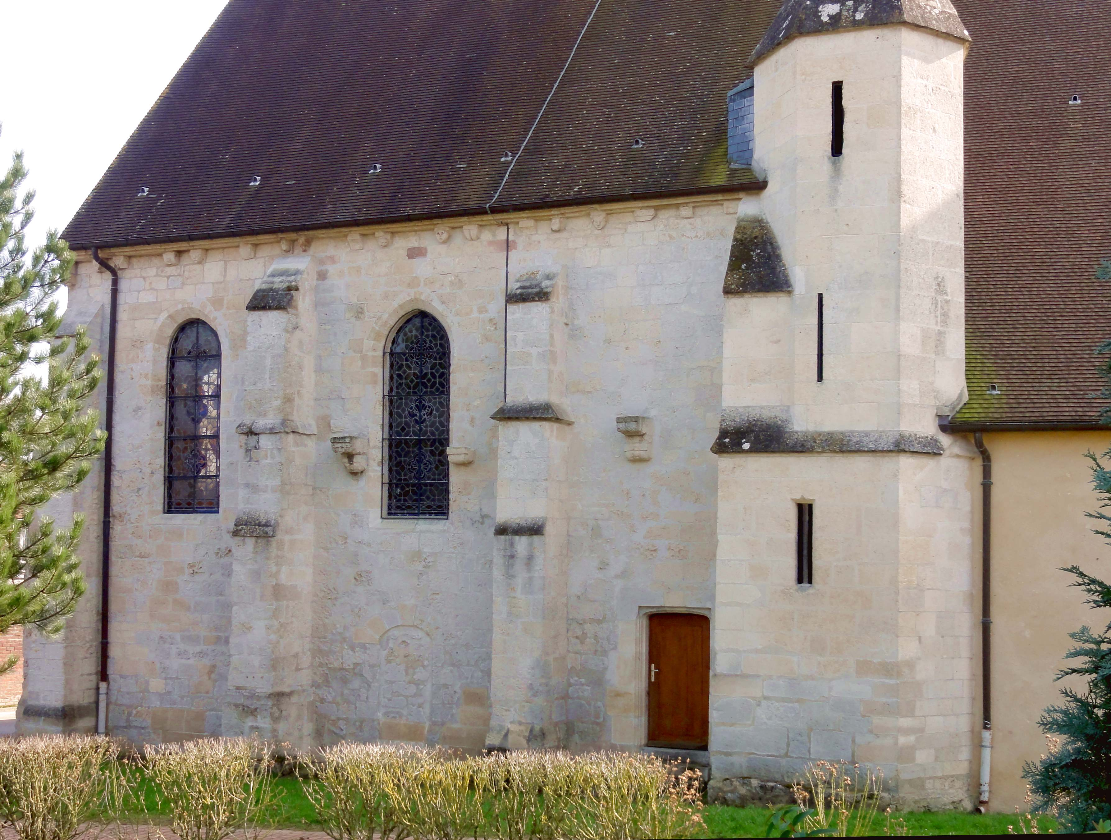 Église Saint-Denis de Bornel - voir titre.